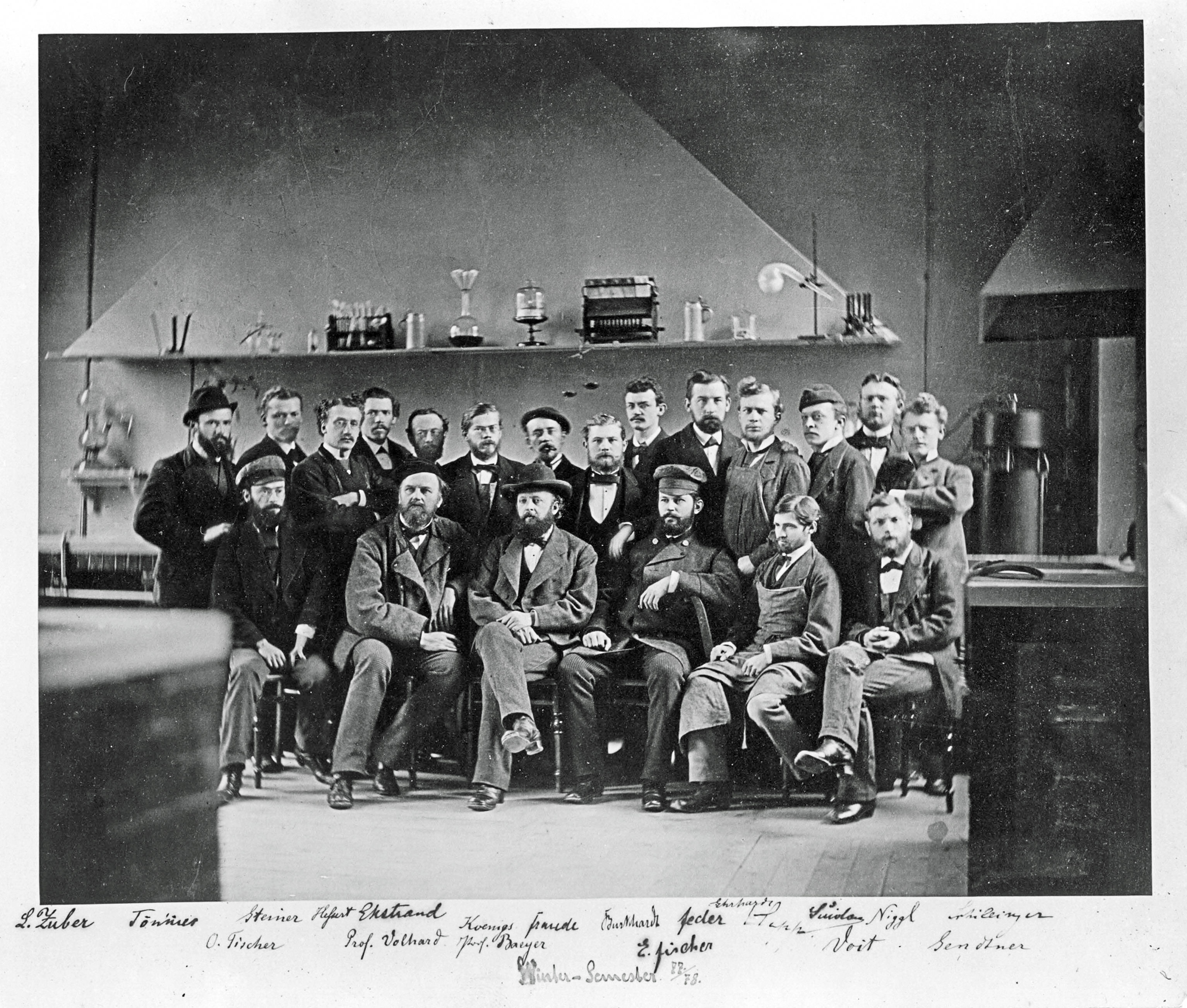 LMU München - Chemie-Professoren und ihre Studenten/Doktoranten Wintersemester 1877/1878 1st row (standing) v.l.n.r. L. Zuber Tönn.. Antal Steiner (* 1848; † 1905) ?? Dr. Åke Gerhard Ekstrand (* 1846; † 1933); from Sweden Dr. Wilhelm Koenigs (* 22. April 1851 in Dülken; † 15. Dezember 1906 in München), 1881 Habilitation [1][2] Georg Fraude (* 1848; † 1899) Johann Baptist Burkhardt (* 18??; † 1920) Hans von Pechmann (* 1. April 1850 in Nürnberg; † 19. April 1902 in Tübingen) Feder Dr. Eduard Hepp (* 11. Juni 1851 in Straßburg, † 18. Juni 1917 in Frankfurt/Main) ?? Niggl Albin Schillinger (* 18??; † 1919) 2nd row (sitting) v.l.n.r. Dr. Otto Fischer (* 28. November 1852 in Euskirchen; † 4. April 1932 in Erlangen), 1878 Habilitation Prof. Jacob Volhard (* 4. Juni 1834 in Darmstadt; † 14. Januar 1910 in Halle/Saale) Prof. Adolf Baeyer (* 31. Oktober 1835 in Berlin; † 20. August 1917 in Starnberg) Dr. Emil Fischer (* 9. Oktober 1852 in Euskirchen; † 15. Juli 1919 in Berlin), 1878 Habilitation Labordiener Veit ??